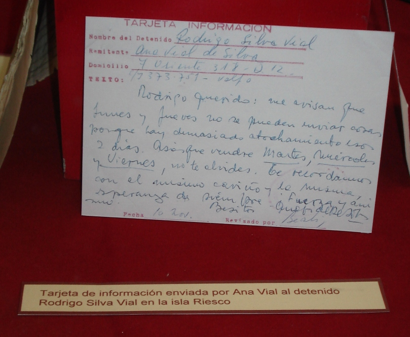 Tarjeta de información de detenidos desaparecidos durante la dictadura militar de Augusto Pinochet. Archivo Nacional de Chile.